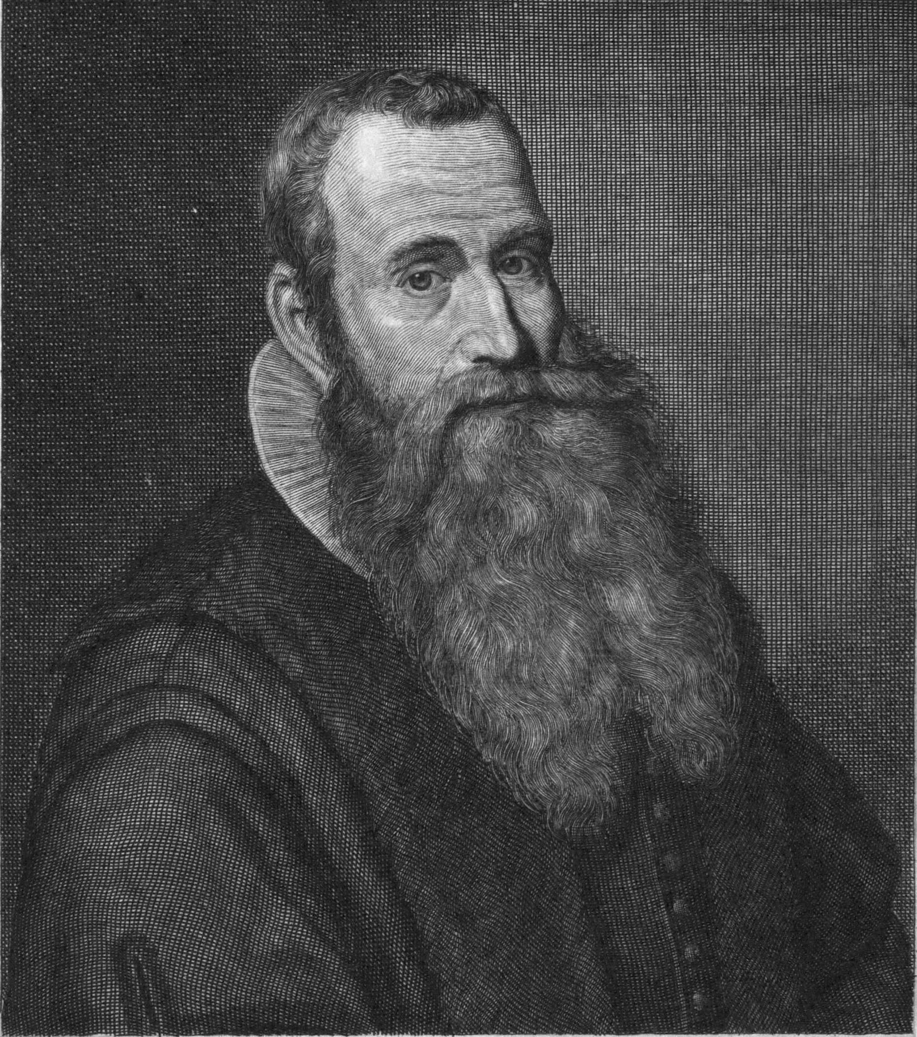 Johannes Bogerman